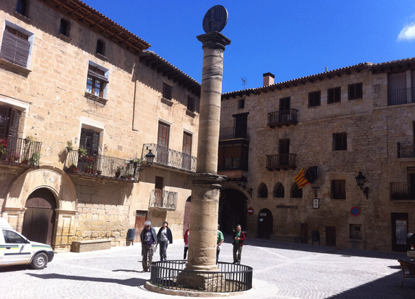 Cretas/Queretes. Matarraña/Matarranya. Aragón/Aragó. Plaza de España